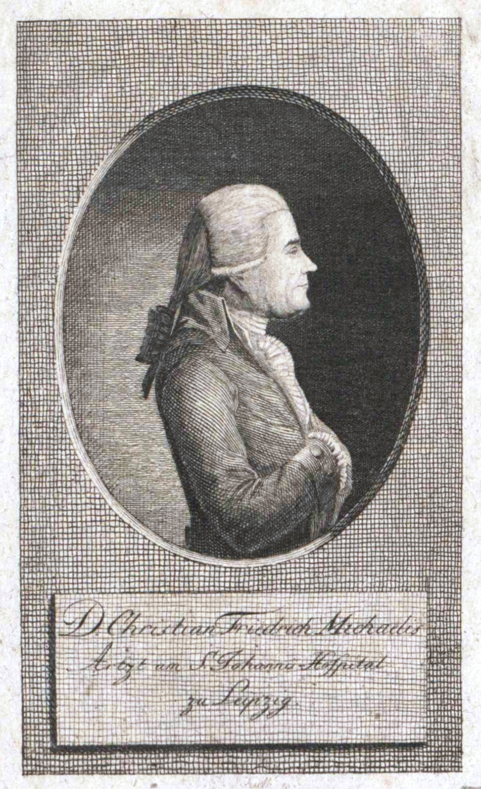 Portrait Christian Friedrich Michaelis